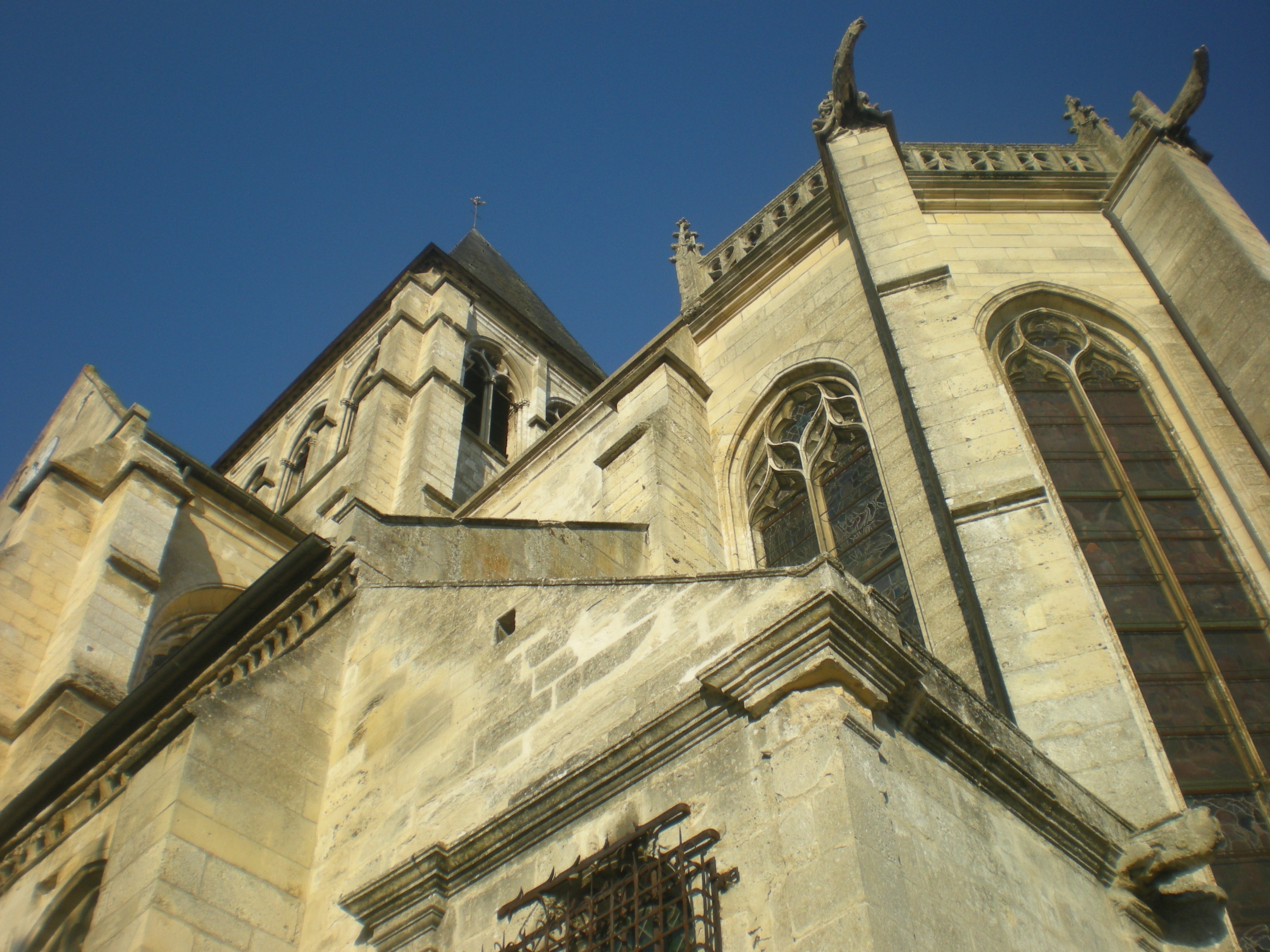 vue sud-est de l'église saint léger d'agnetz